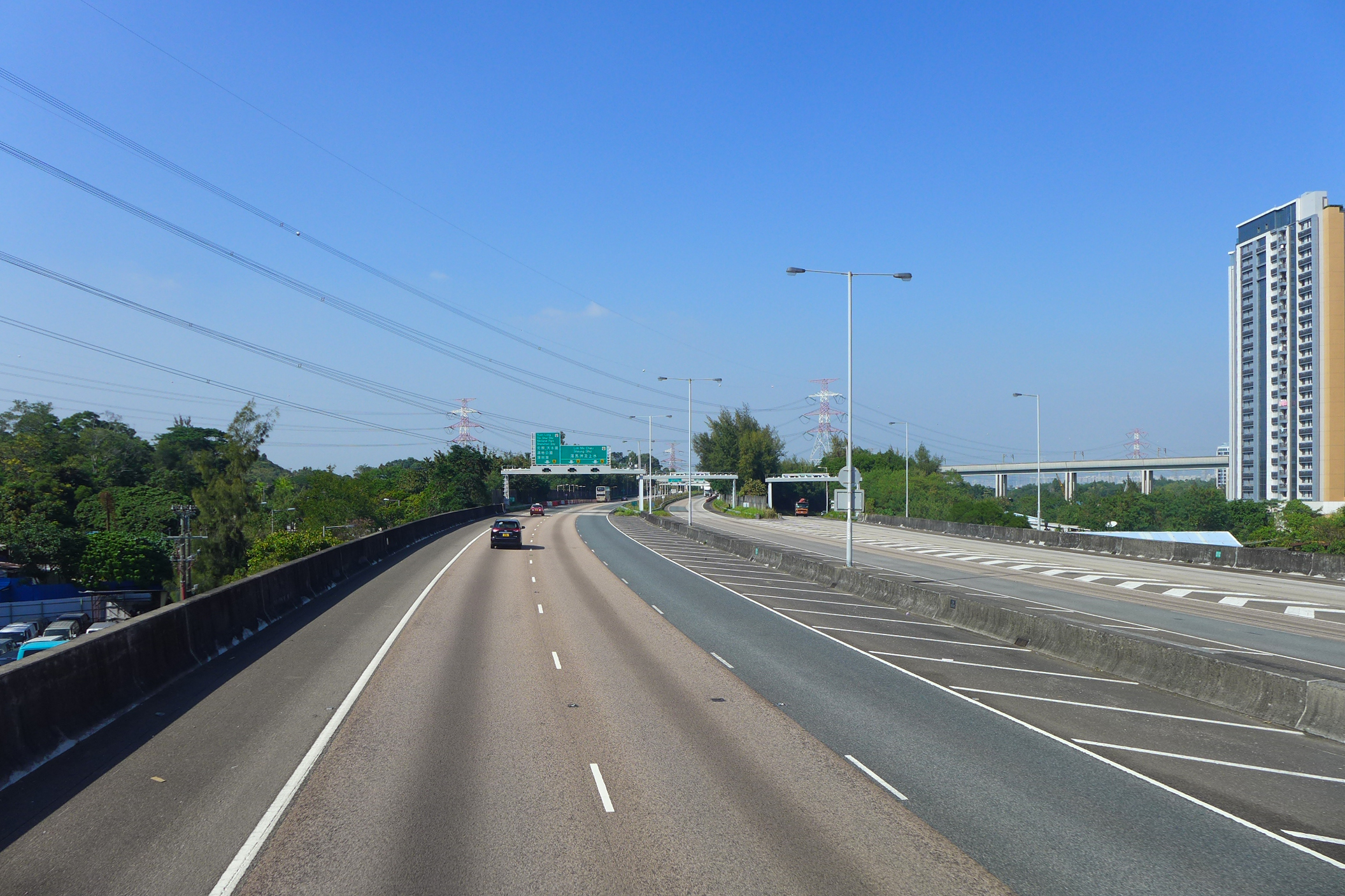 Tsing Long Highway